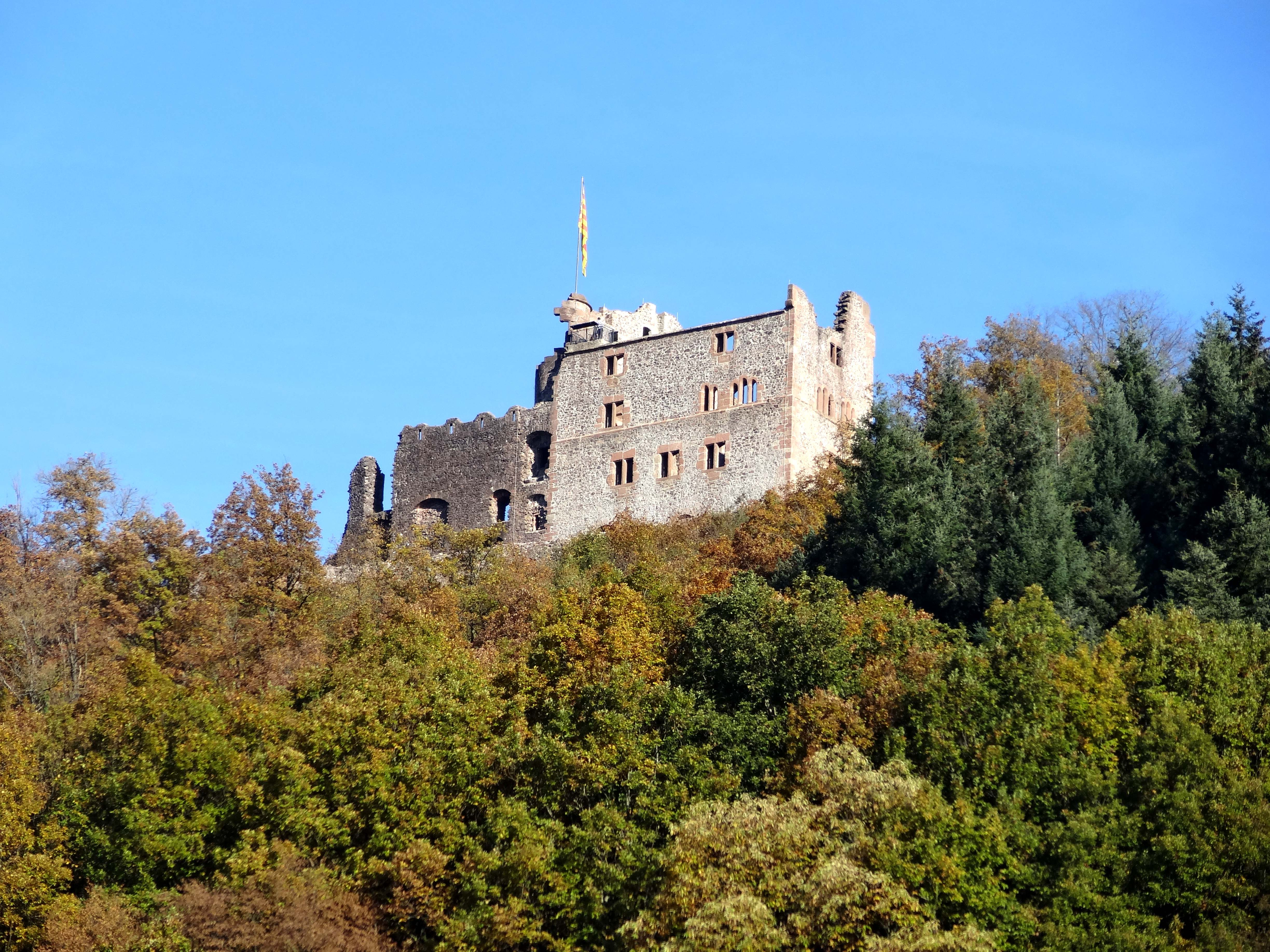 Burgruine Hohengeroldseck - siehe Titel.